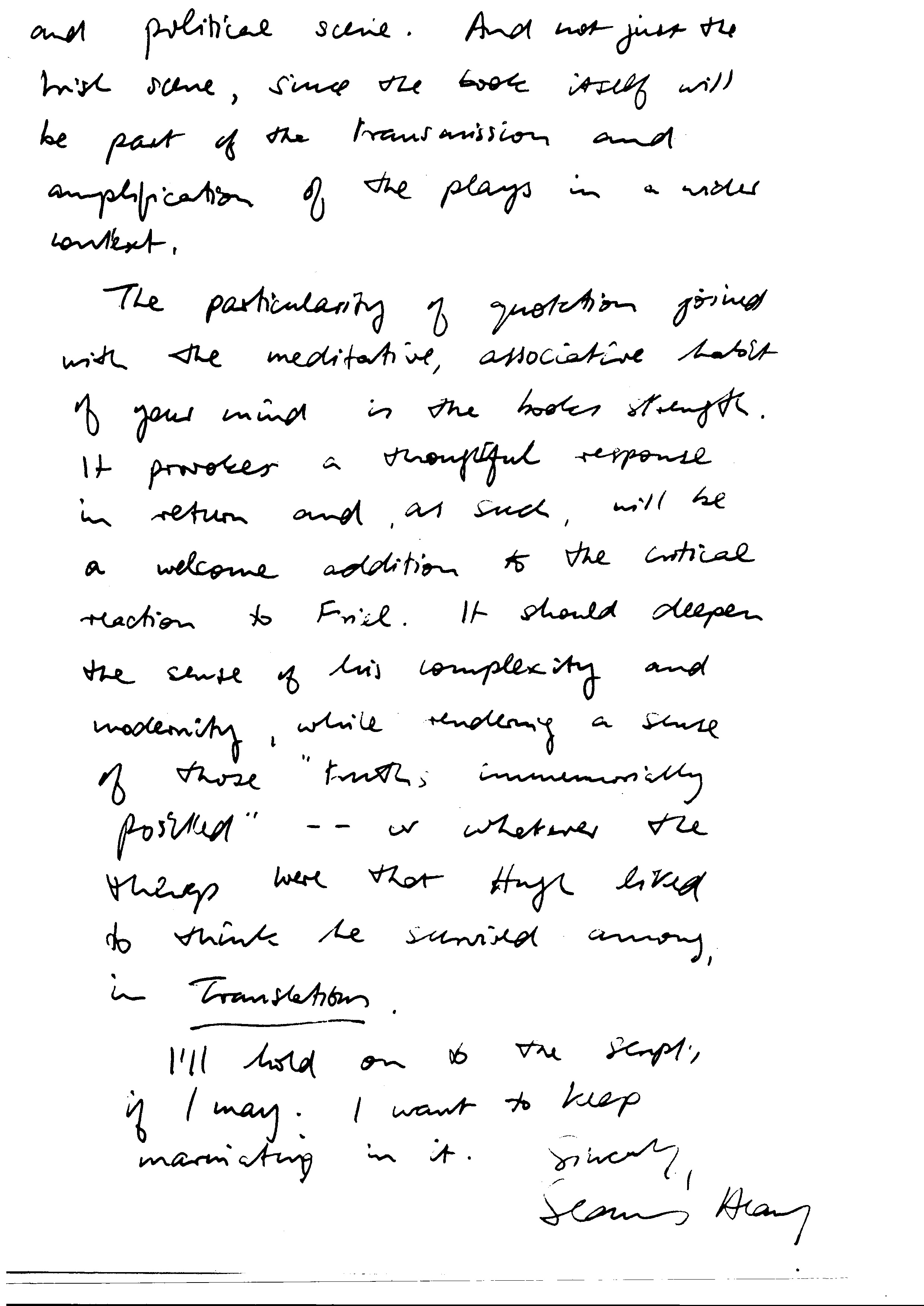 Personal letter to the author and critic, Richard Pine, from the Irish poet, Seamus Heaney, dated 5th April 1989 (page2)